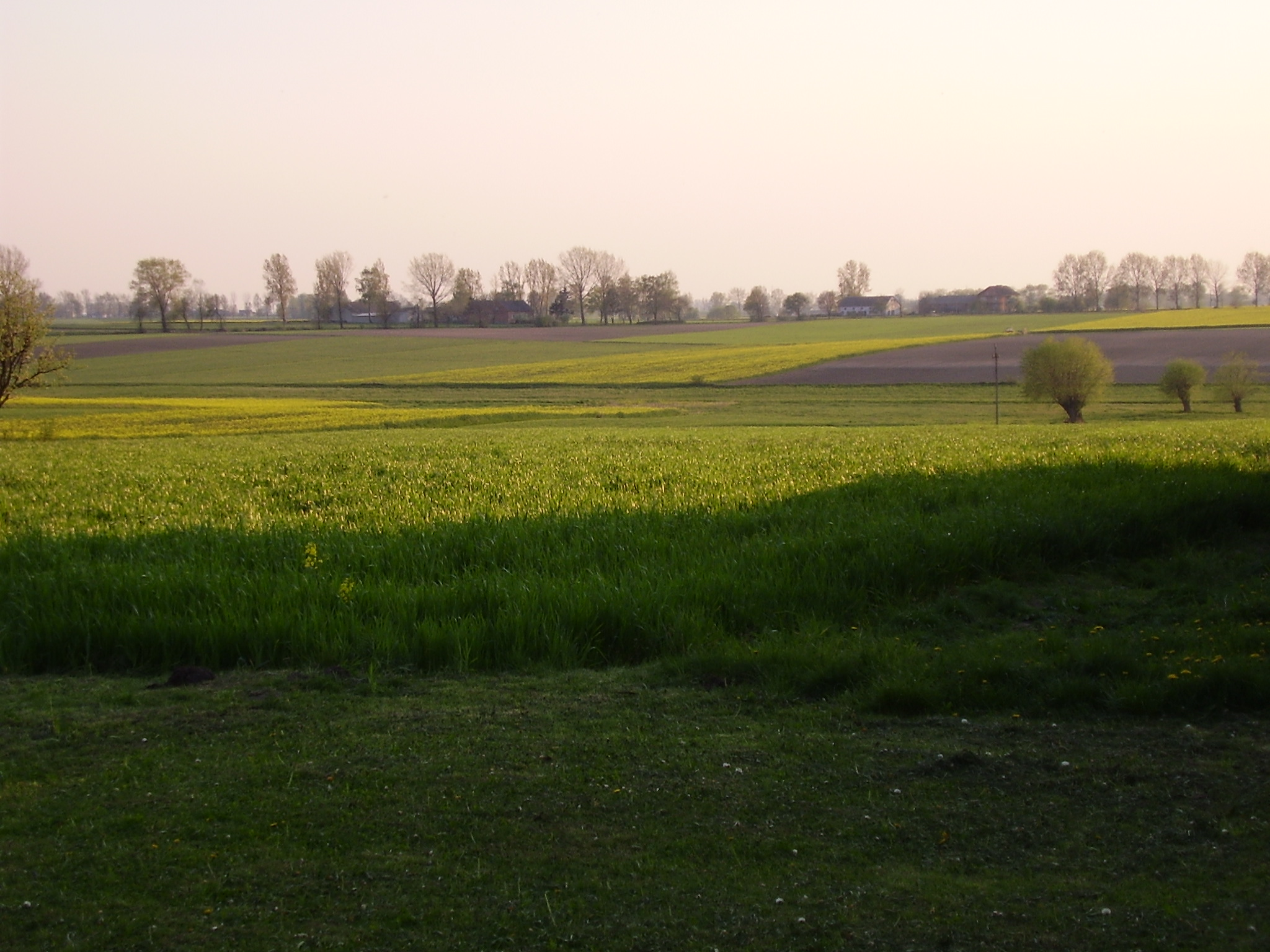 Rolny krajobraz Kolonii Oporów